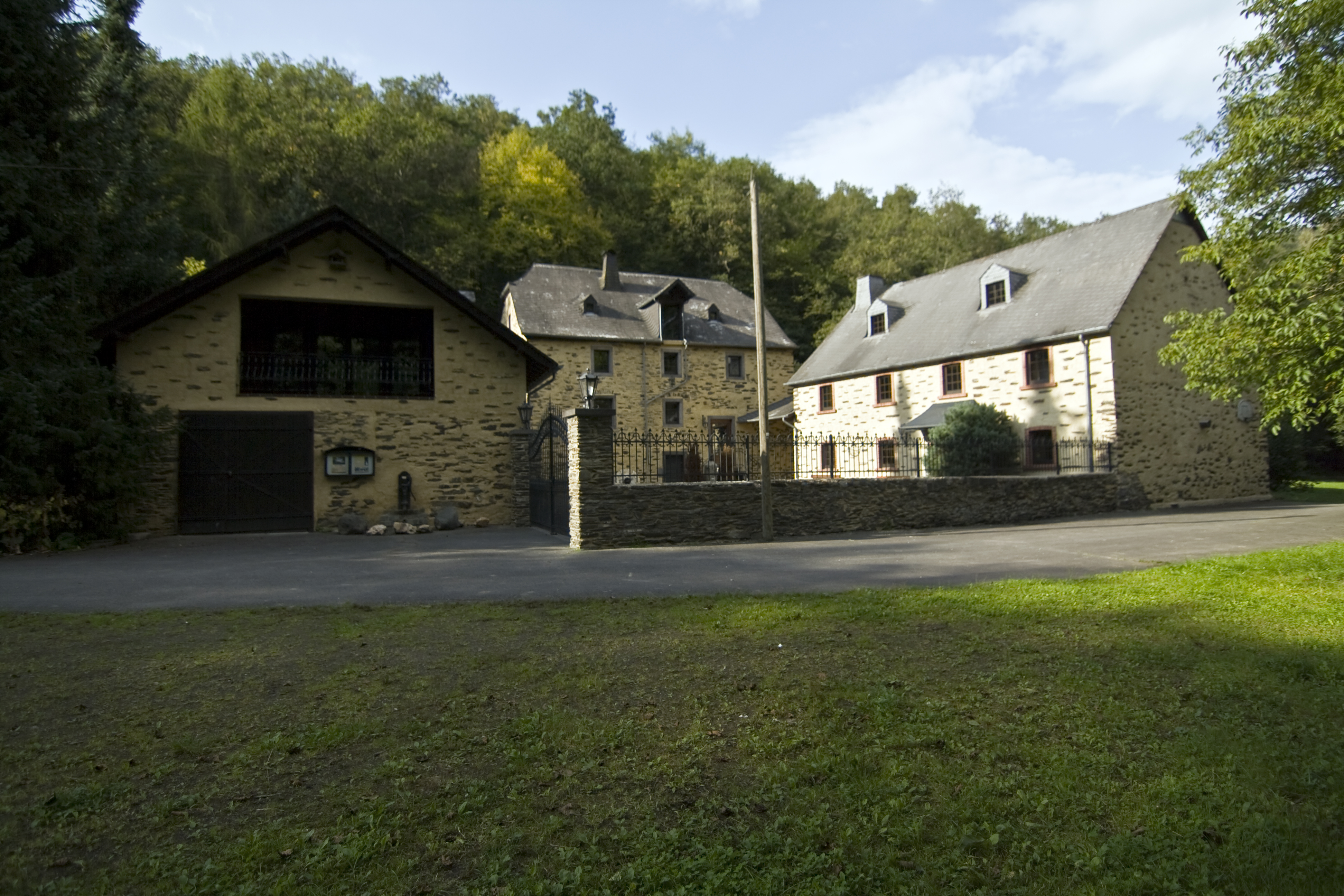 Geringermühle; Bruchsteinbau, Krüppelwalmdach, 18. und 19. Jahrhundert